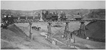 La ligne de chemin de fer Decauville Narès-Inglis-Topçin-Vatiluk ravin de Vatiluk, (décembre 1916)